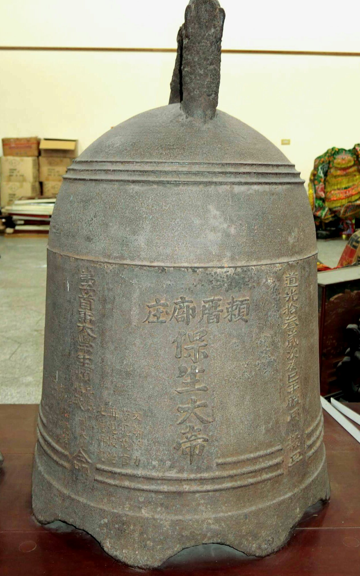 元保宮-清道光鉎鐵大鐘